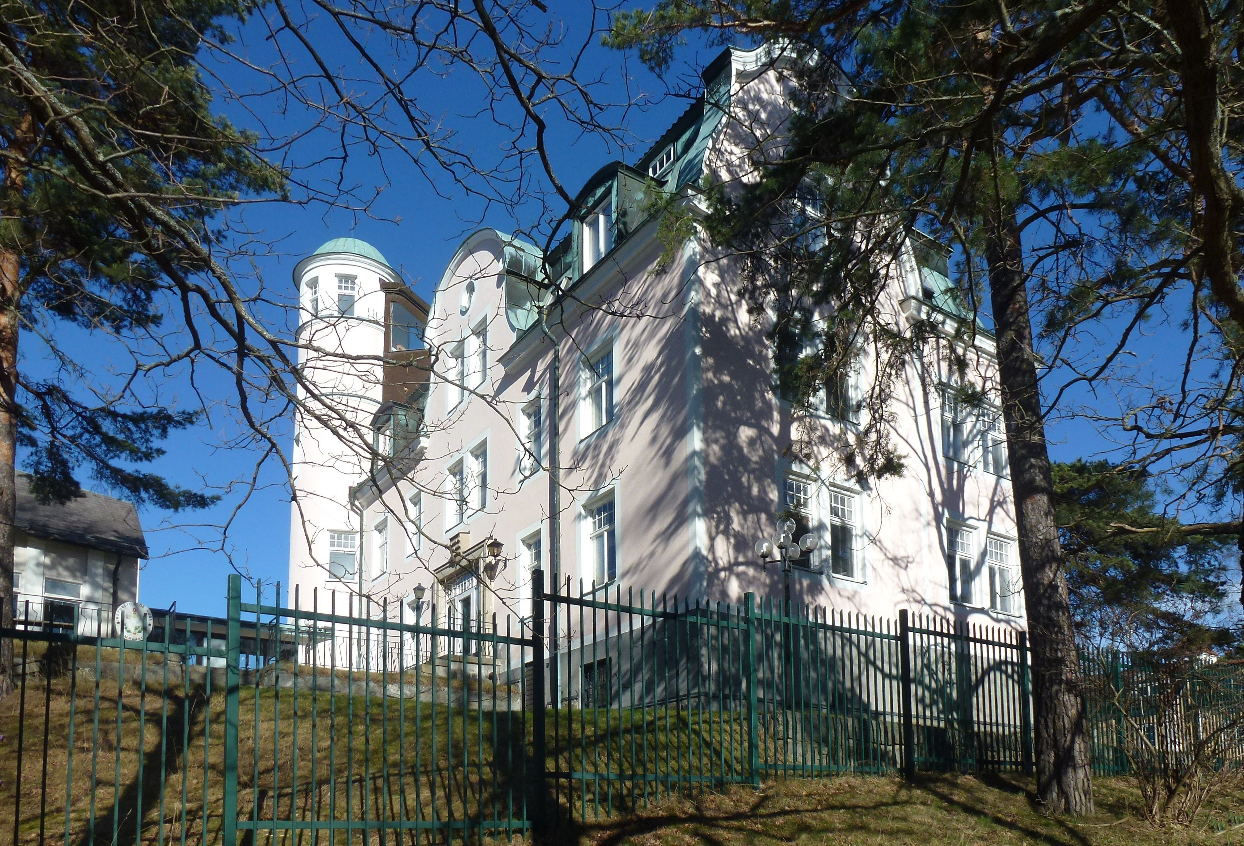 Sturevägen 9, tidigare "Villa Skoga" och Stocksunds kommunalhus, idag Kubas ambassad i Danderyd